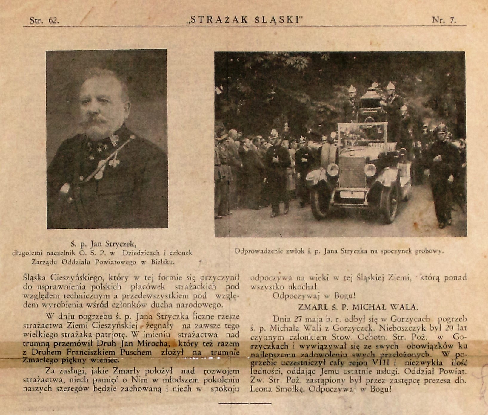 Wspomnienie pośmiertne o Janie Stryczku, naczelniku Ochotniczej Straży Pożarnej w Dziedzicach, teściu Stanisława Krzyżowskiego – cz. 2